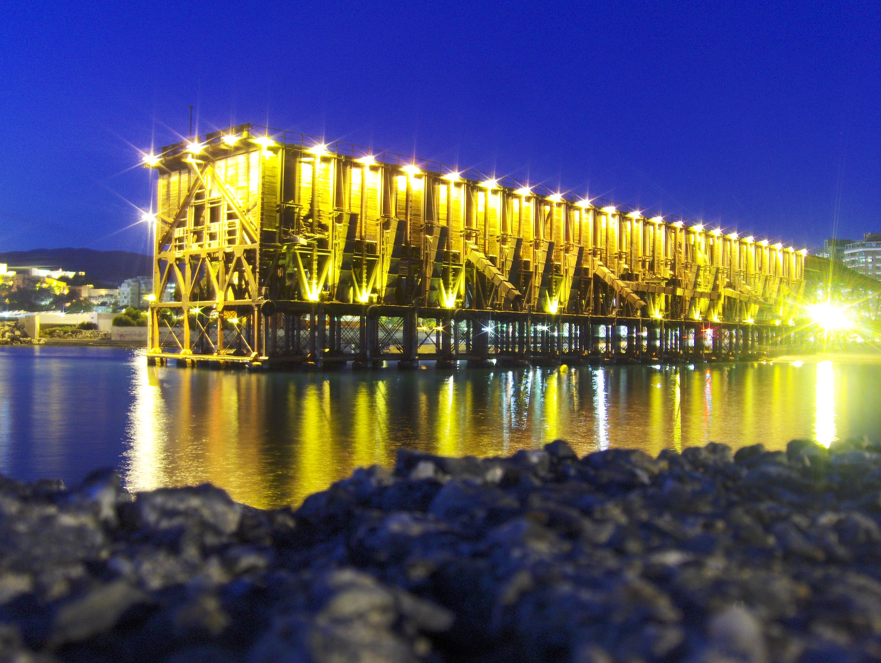 Vista desde el mar del Cable Inglés en Almería